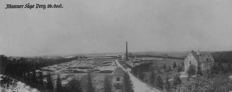 Postkarte mit der Manner Säge in Perg Oberösterreich als Motiv